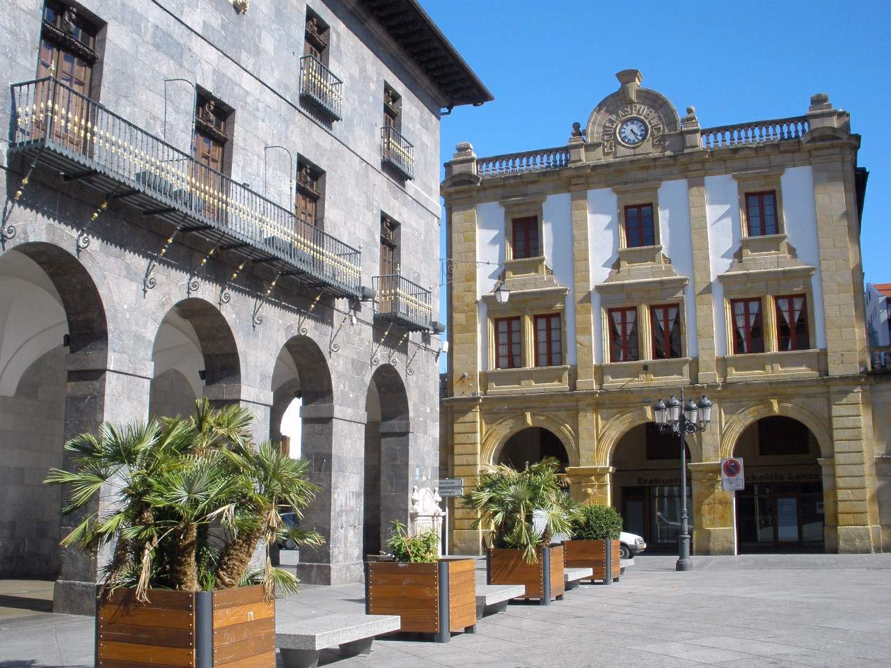 Herriko Enparantza (Azkoitia, Gipuzkoa)